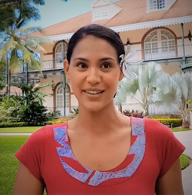 Teaser La nuit du droit - Hinarere Taputu, Assemblee Polynesie